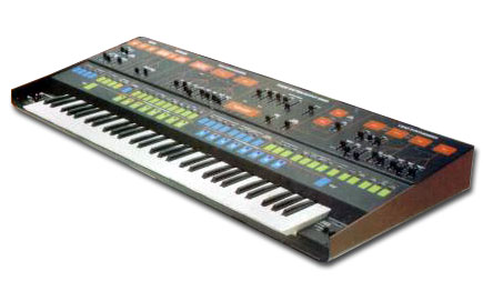 sintetizzatore ARP Quadra Licensing Categoria:Sintetizzatori ARP